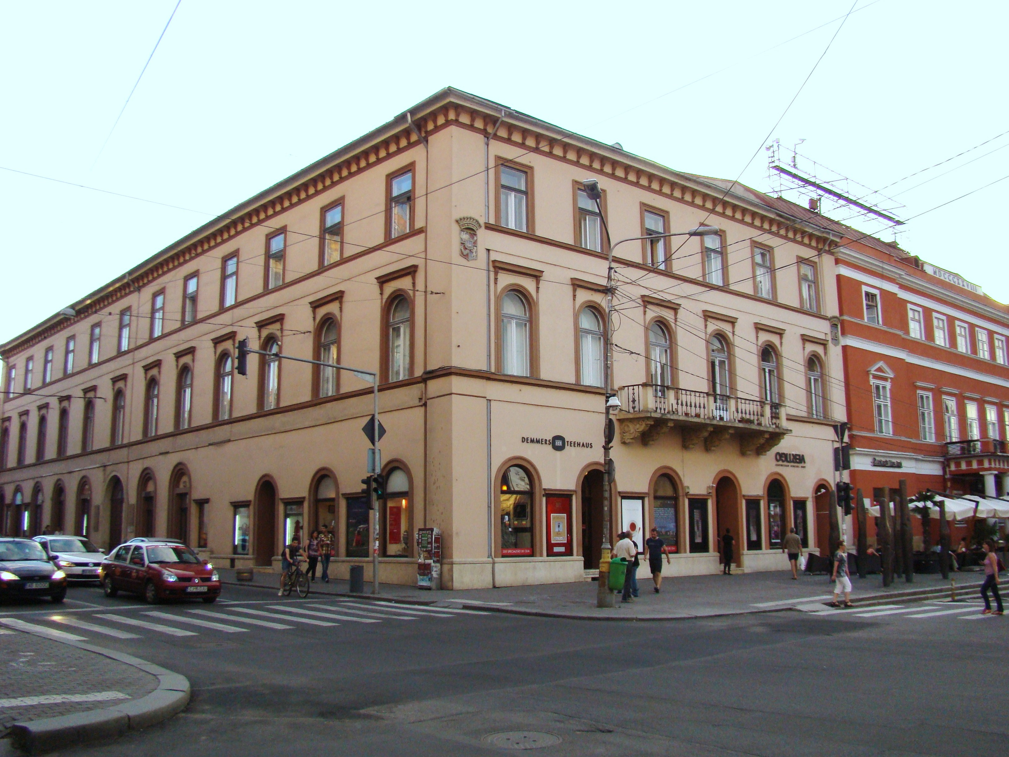 Palatul Bornemisza